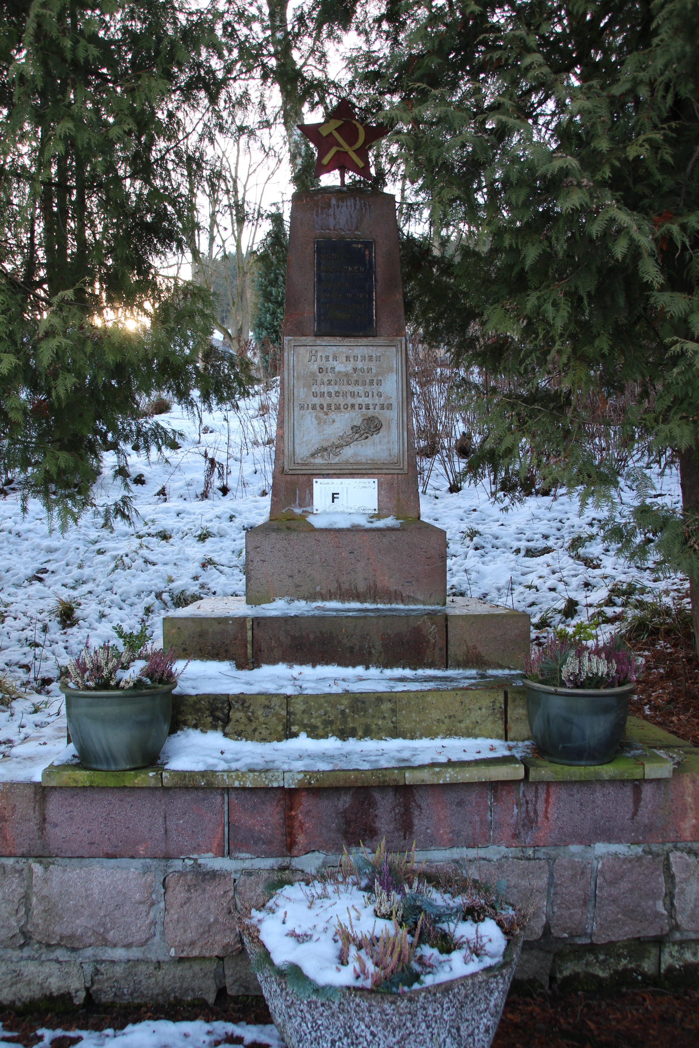 Alter Friedhof in Schönheide#Gedenkstätte für Opfer aus der Zeit des Nationalsozialismus: Denkmal für die 30 am 14. April 1945 auf dem Todesmarsch in Schönheide ermordeten KZ-Häftlinge der Außenlager Lengenfeld und Zwickau des KZ Flossenbürg sowie für den 1942 von den Nationalsozialisten hingerichteten Rudi Radecker.Text auf der Plakette an der Gedenkstele für die Opfer des Todesmarsches: "Hier ruhen die von Nazihorden unschuldig Hingemordeten". Früher war dieser Text in die Stele selbst eingemeiselt. Weswegen auf diesen eingemeiselten Text eine gegossene Plakette geschraubt wurde, ist nicht bekannt. Darunter brachte die Gemeinde Schönheide in den 2000er Jahren eine Erinnerungstafel an, die ihr bei einem der regelmäßigen Besuche von französischen früheren Kz-Häftlingen, deren Verwandten und Nachfahren in den 2000er Jahren übergeben worden war. Diese Tafel ist nicht für den Außenbereich gedacht. Sie hat unter Wind und Wetter gelitten. Abbildung und Text sind kaum noch zu erkennen. Sie zeigt ein an der Häftlingskleidung angebrachtes Kennzeichen mit blau-weißen Streifen und einem "F" für Frankreich. Die Tafel hat diesen Text: ASSOCIATION DES DEPORTES DE FLOSSENBÜRG ET KOMMANDOS. IN MEMORIAM (